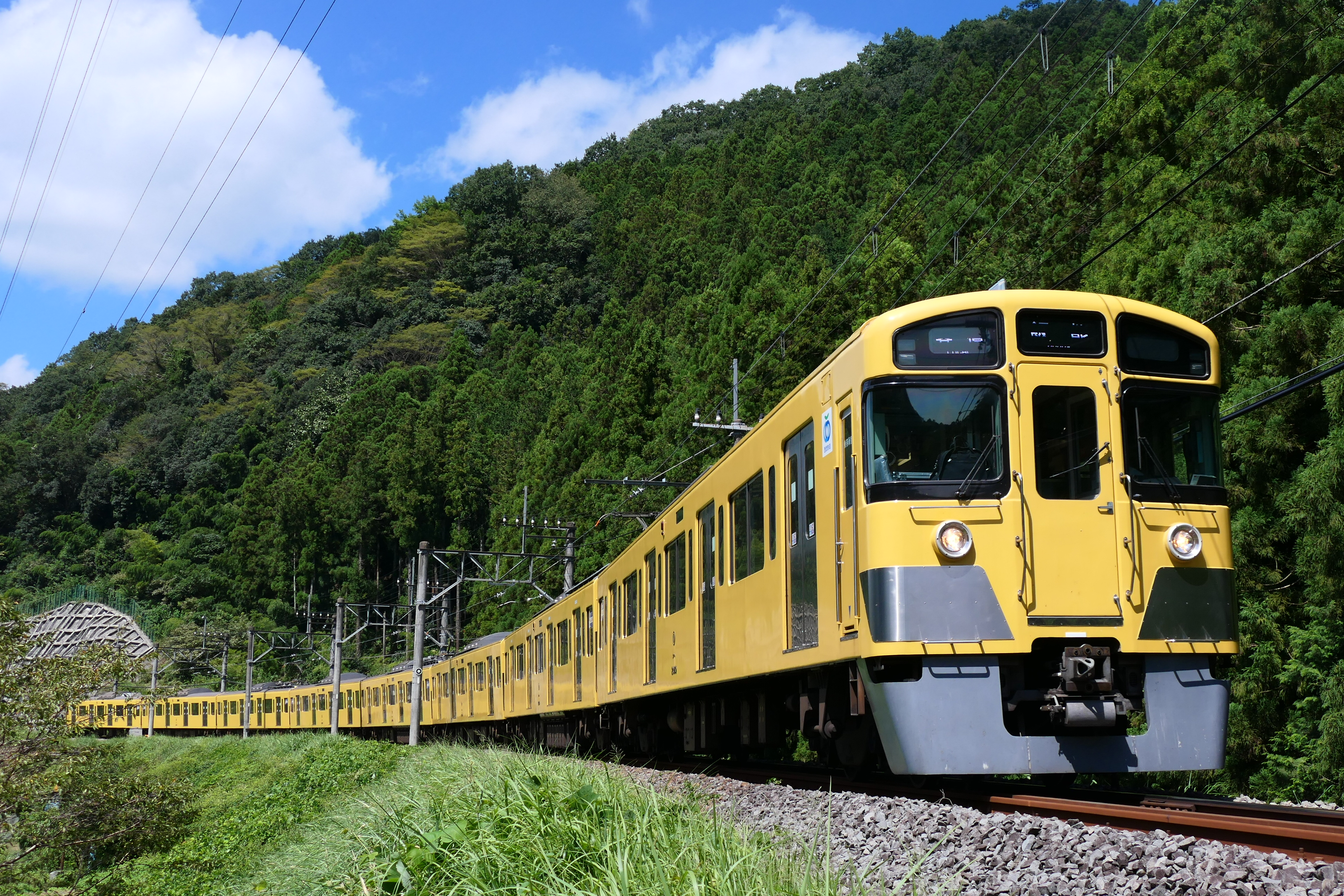 西武鉄道2000系電車。東 (ひがし)吾 (あが)野 (の) - 吾 (あが)野 (の)駅間にて。